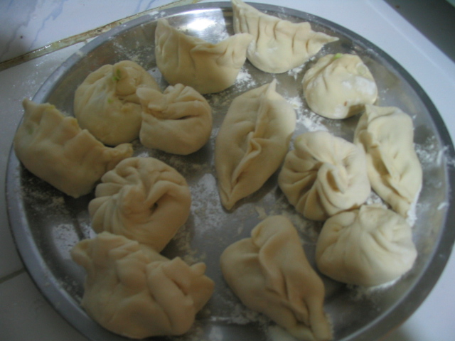 Tibetaj buletoj "momo"